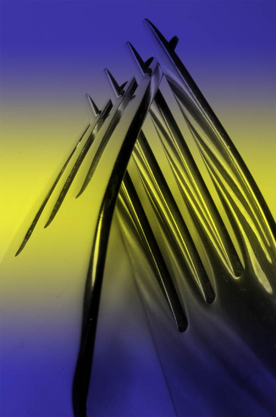 Fourchettes aux couleurs européennes